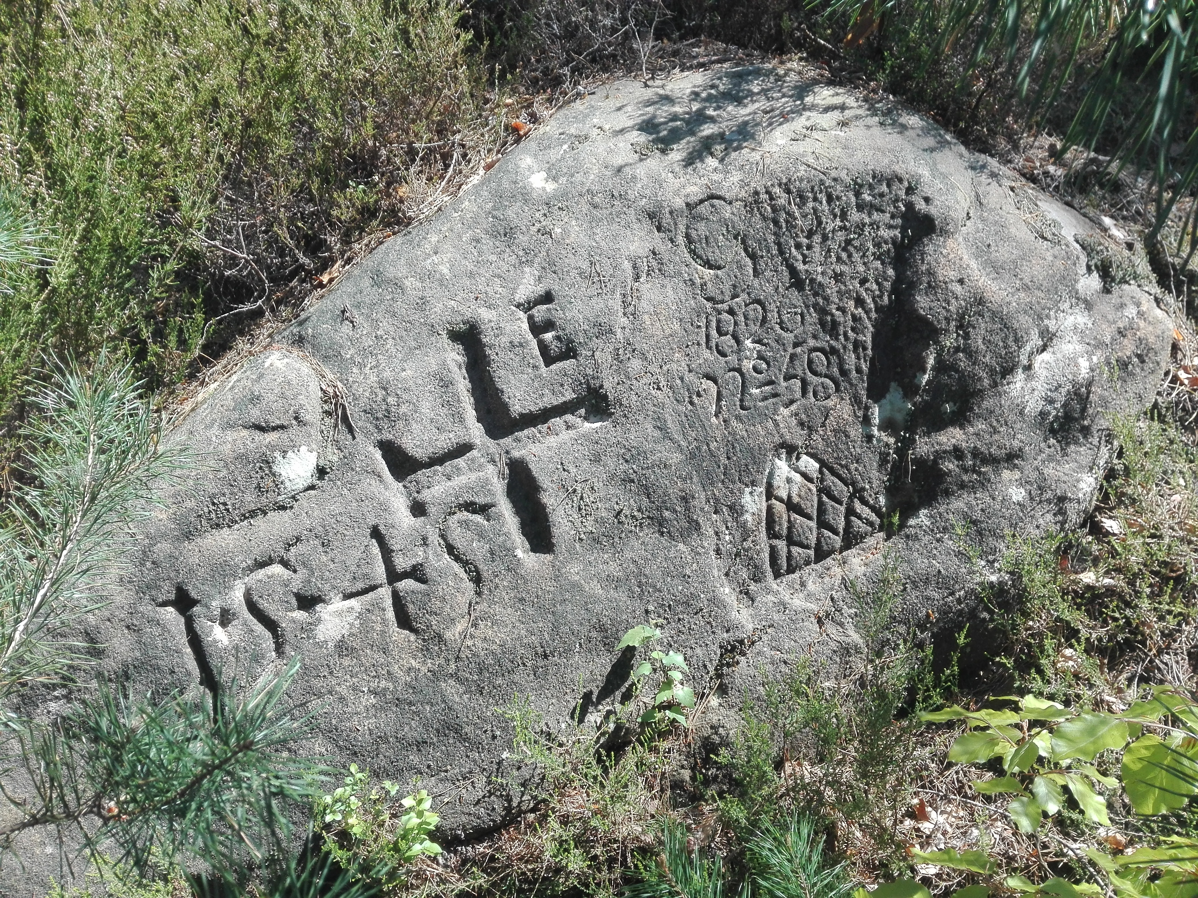 Loogfels am Cyriakusweg, bezeichnet 1545; markierte die Grenze zwischen Deidesheim und Gimmeldingen (früher Hirschorn-Lindenberg)